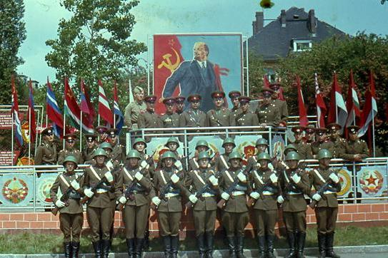 Разведчики 67-го гвардейского мотострелкового полка. 1970.